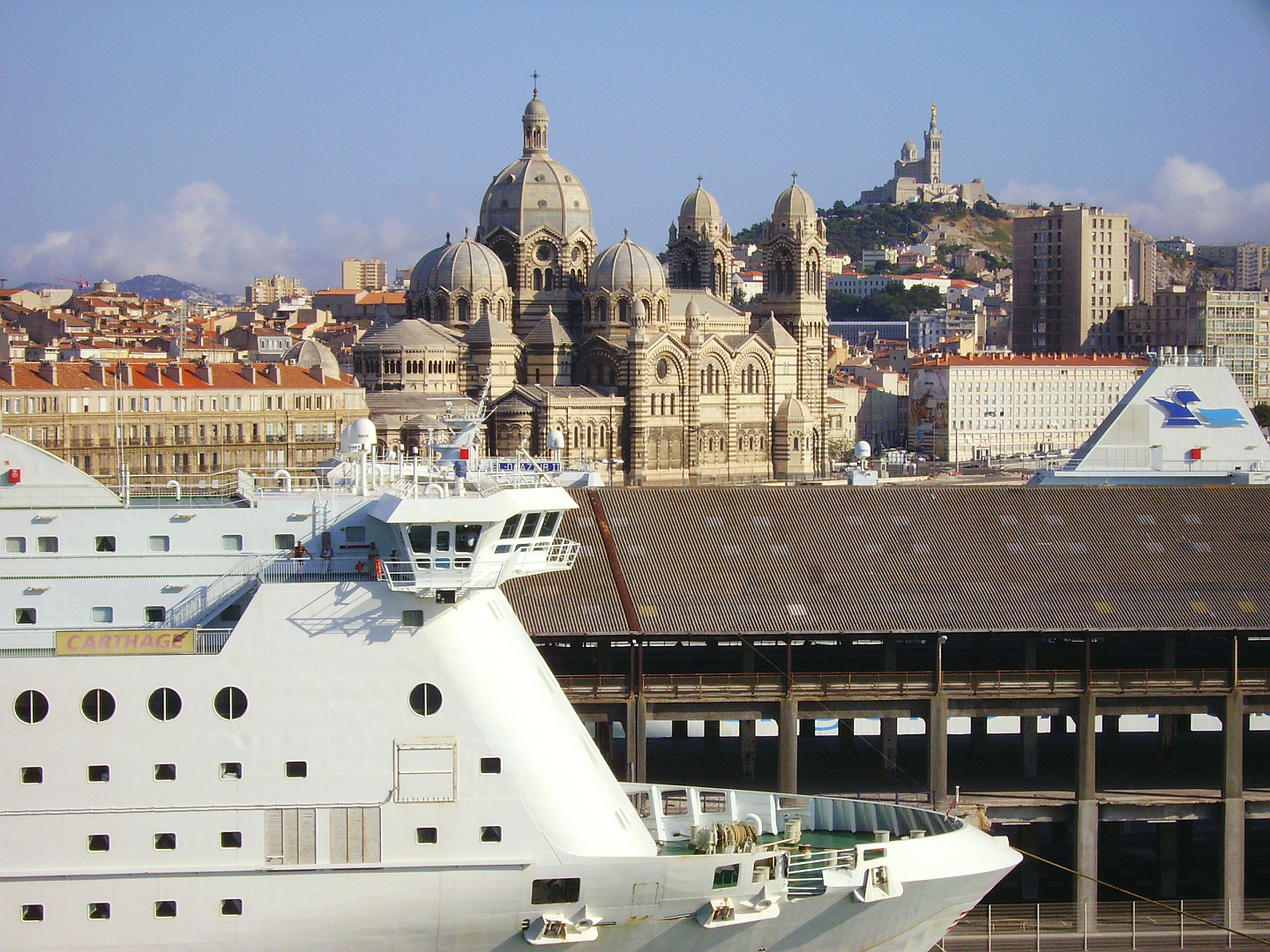 La Cathédrale de la Major et la Basilique Notre-Dame-de-la-Garde, vues depuis le ferry Napoléon Bonaparte au port de Marseille-Joliette le 1 août 2009.